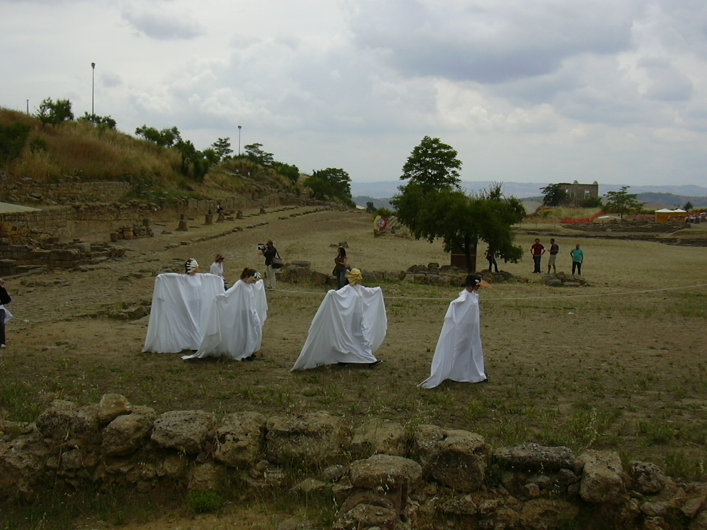 Morgantina_Sicilia:performance teatrali nel sito, il teatro delle scuola